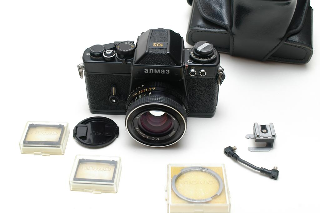 Фотоаппарат Алмаз-103 и аксессуары